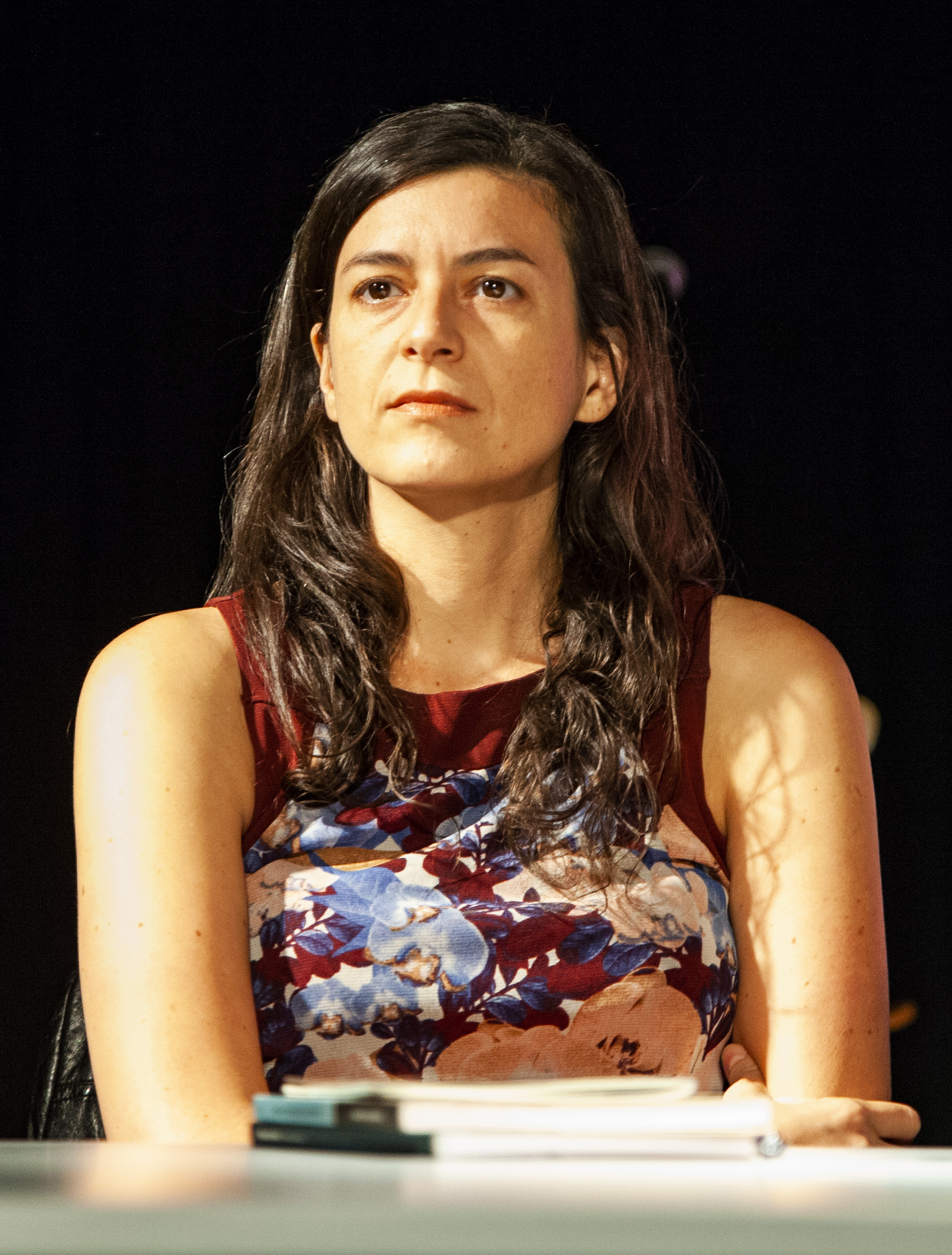 La escritora Samanta Schweblin en el Festival Internacional de Literatura de Buenos Aires (FILBA). Centro Cultural de España en Montevideo, octubre de 2018.